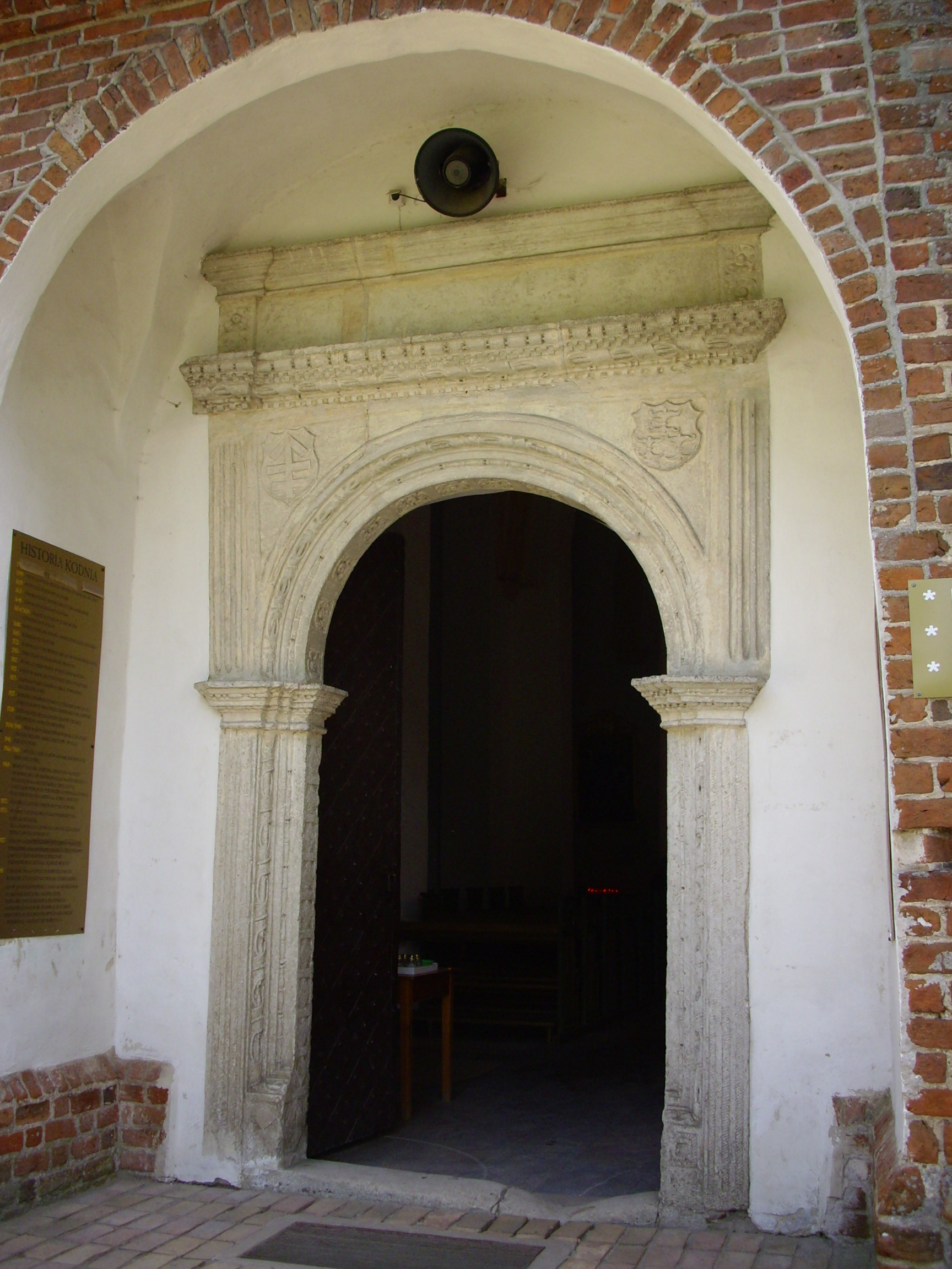 Kodeń. Dawna cerkiew zamkowa. Portal.